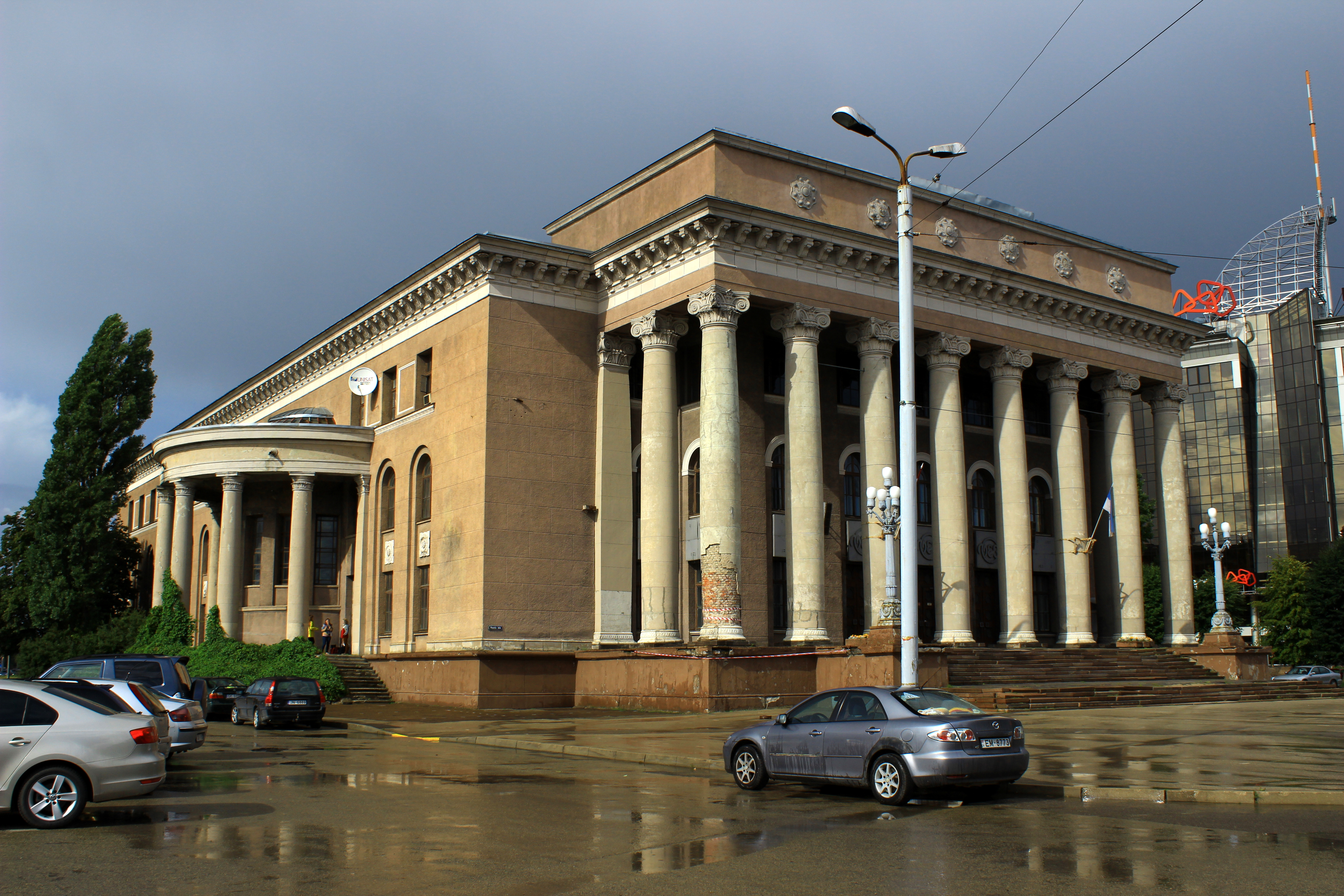 VEF Kultūras pils